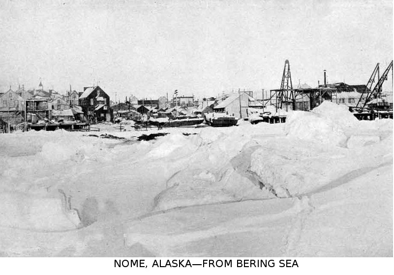 Ville de Nome en Alska.